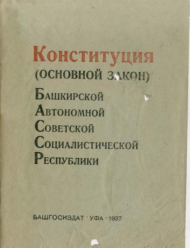 Обложка издания конституции БАССР 1937